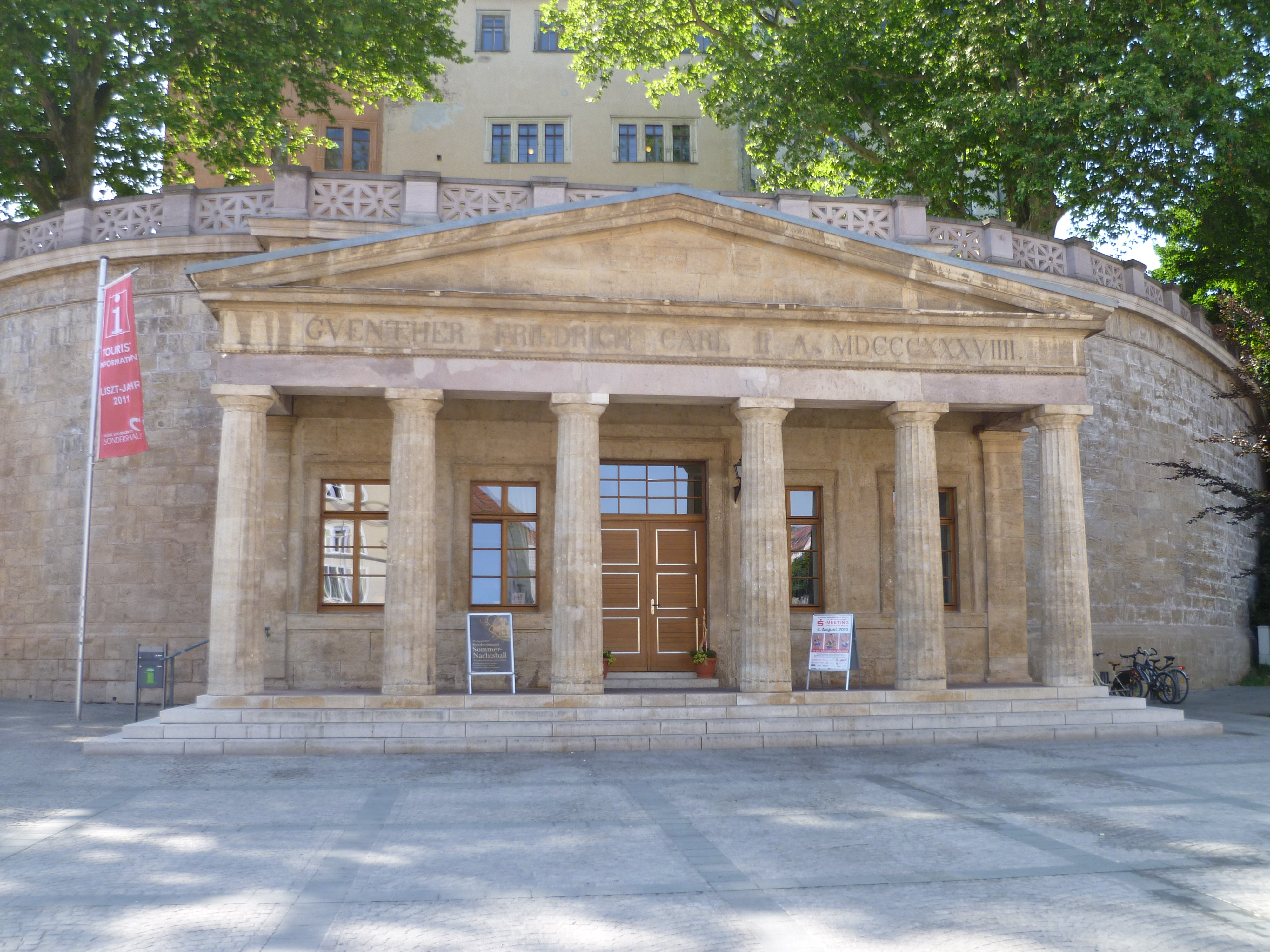 Die Alte Wache in Sondershausen von Scheppig, Touristeninfo